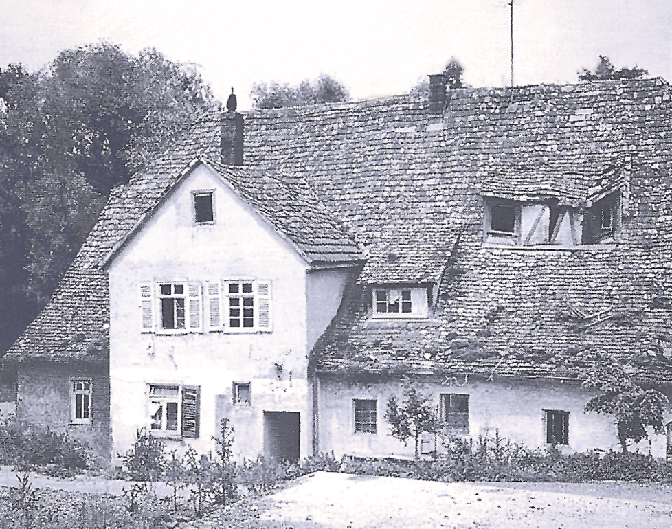 Obere Mühle bei Markgröningen (1993 abgebrochen)